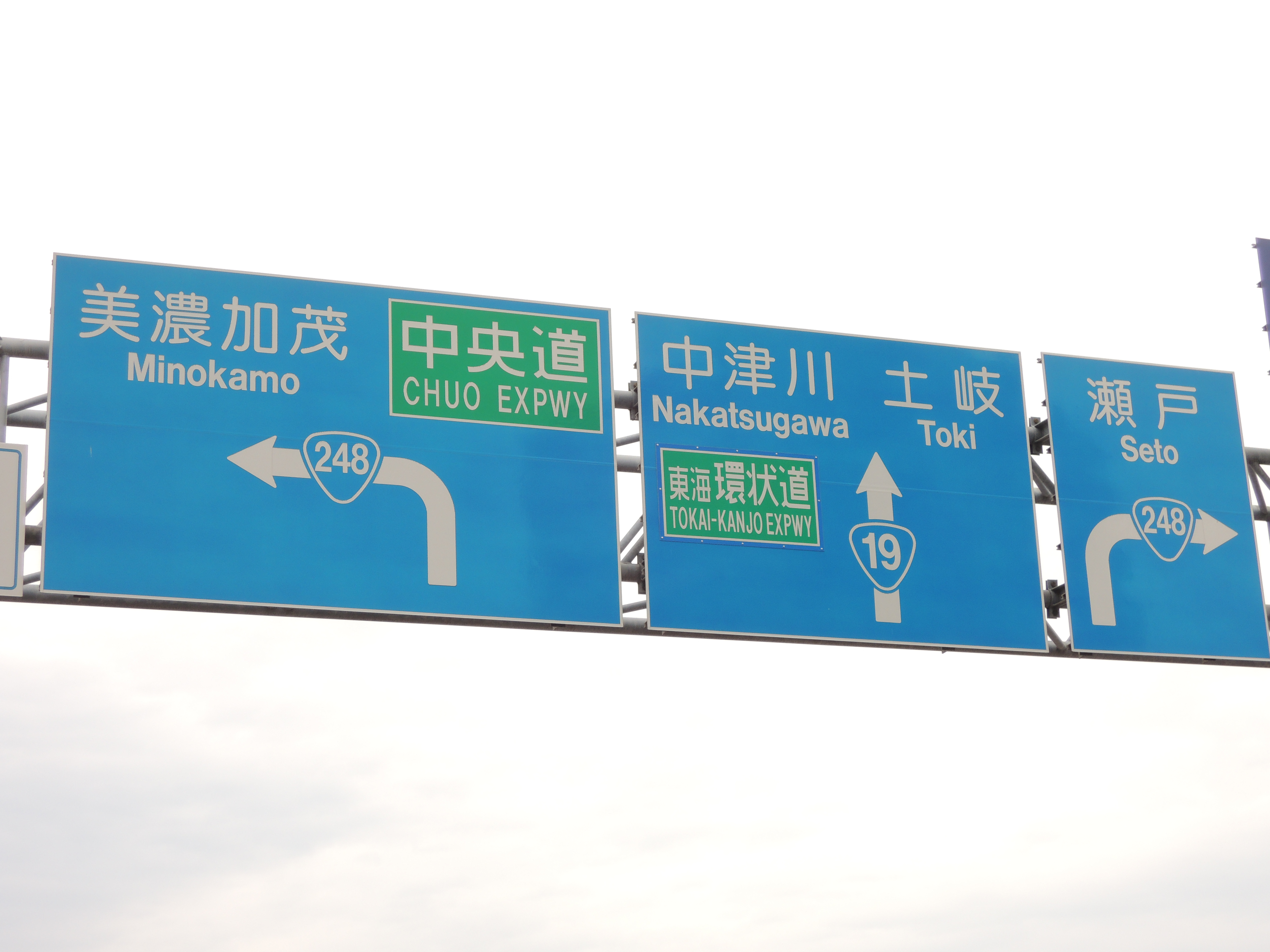 東海環状自動車道 （土岐南多治見インターチェンジ）予告標識 中央道 多治見インターチェンジへは左折（国道19号線 下り 音羽町交差点、岐阜県多治見市）